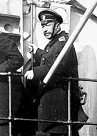 Адмирал Михаил Коронатович Бахирев на кормовом мостике линкора типа «Севастополь»